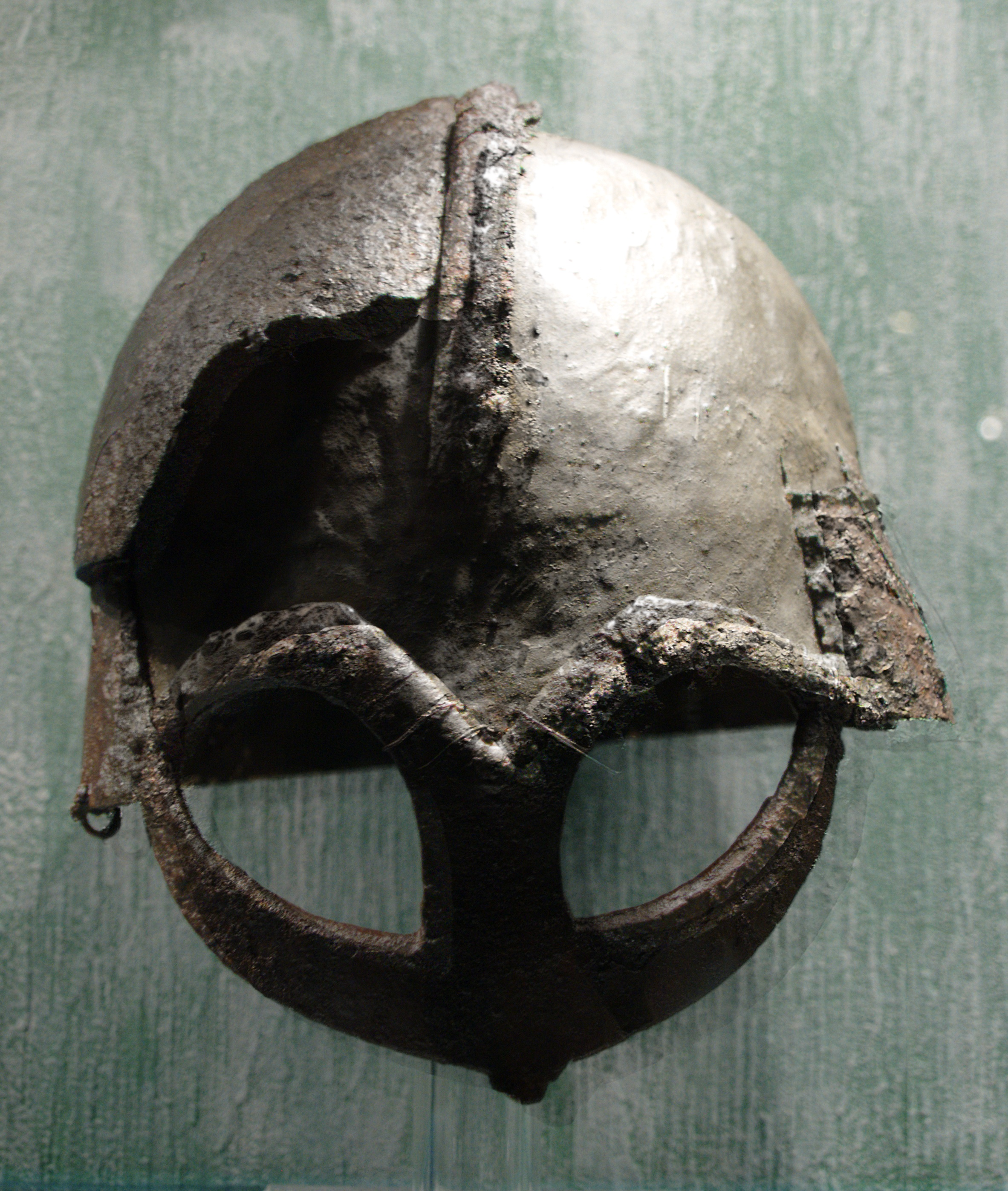 Viking helmet from Gjermundbufunnet, now at Kulturhistorisk museum [1]